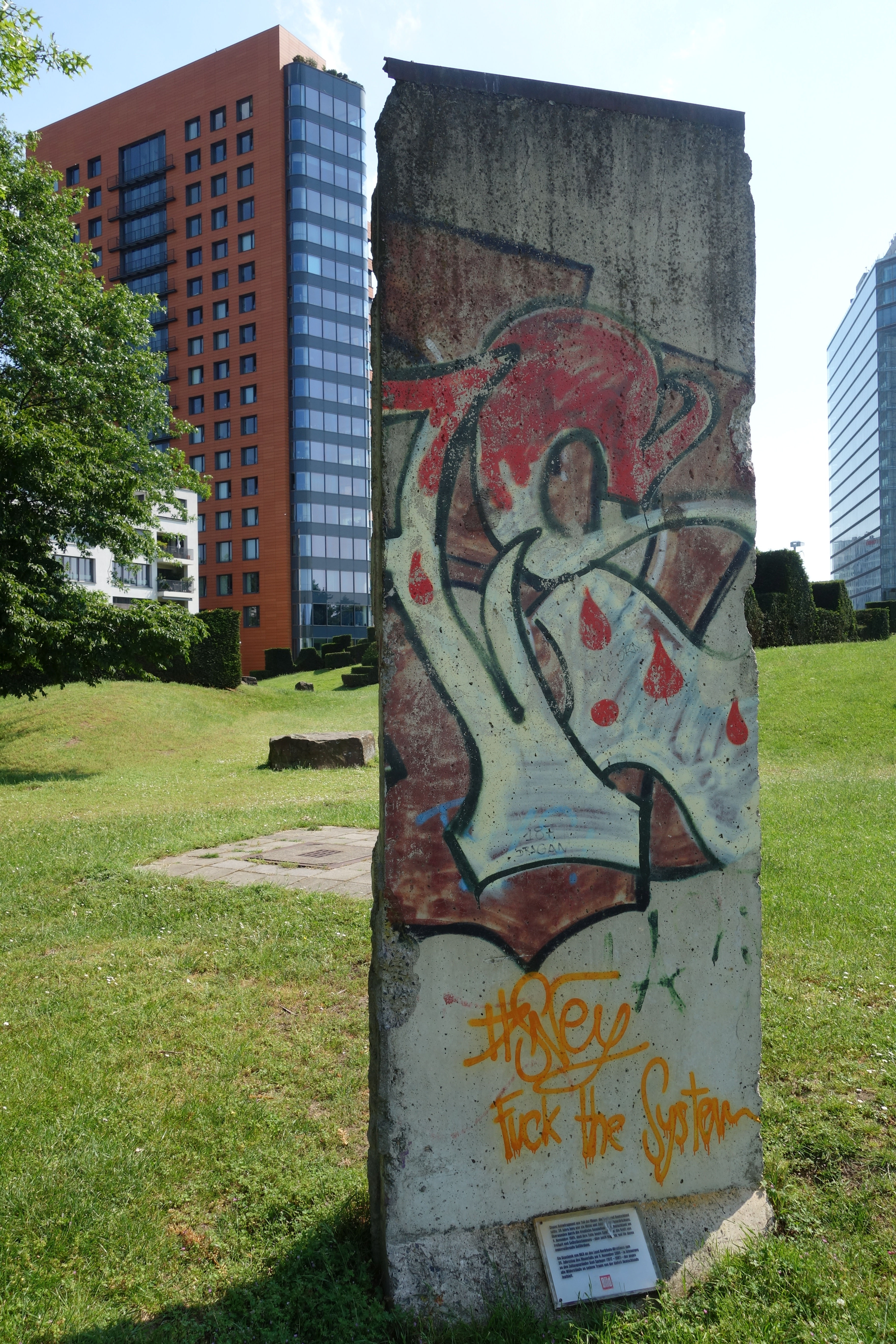 Berliner Mauer, Betonfragment in Düsseldorf-Unterbilk, 2019.